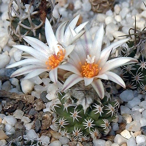 Mehiški kaktus Turbinicarpus dickisoniae